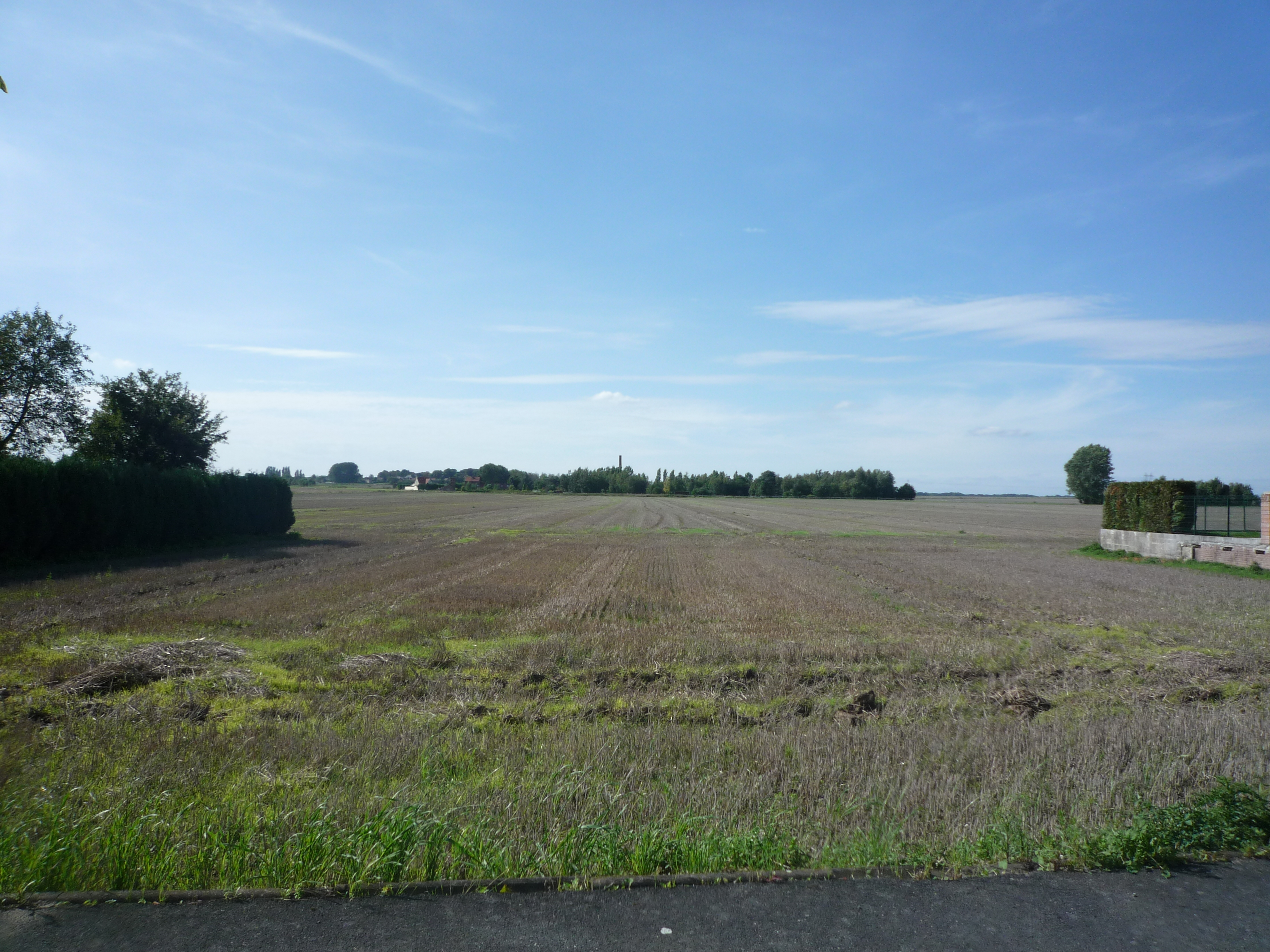 Localisation approximative du site de la Fosse de Monchecourt de la Compagnie des mines d'Aniche à Monchecourt, Nord, Nord-Pas-de-Calais, France.